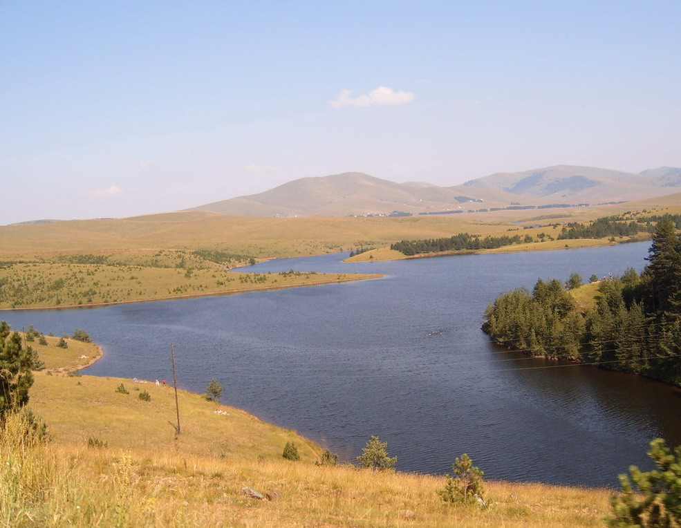 Рибничко језеро лети. Слику снимио Kostas85.